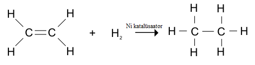 hüdrogeenimise üldskeem eteeni näol